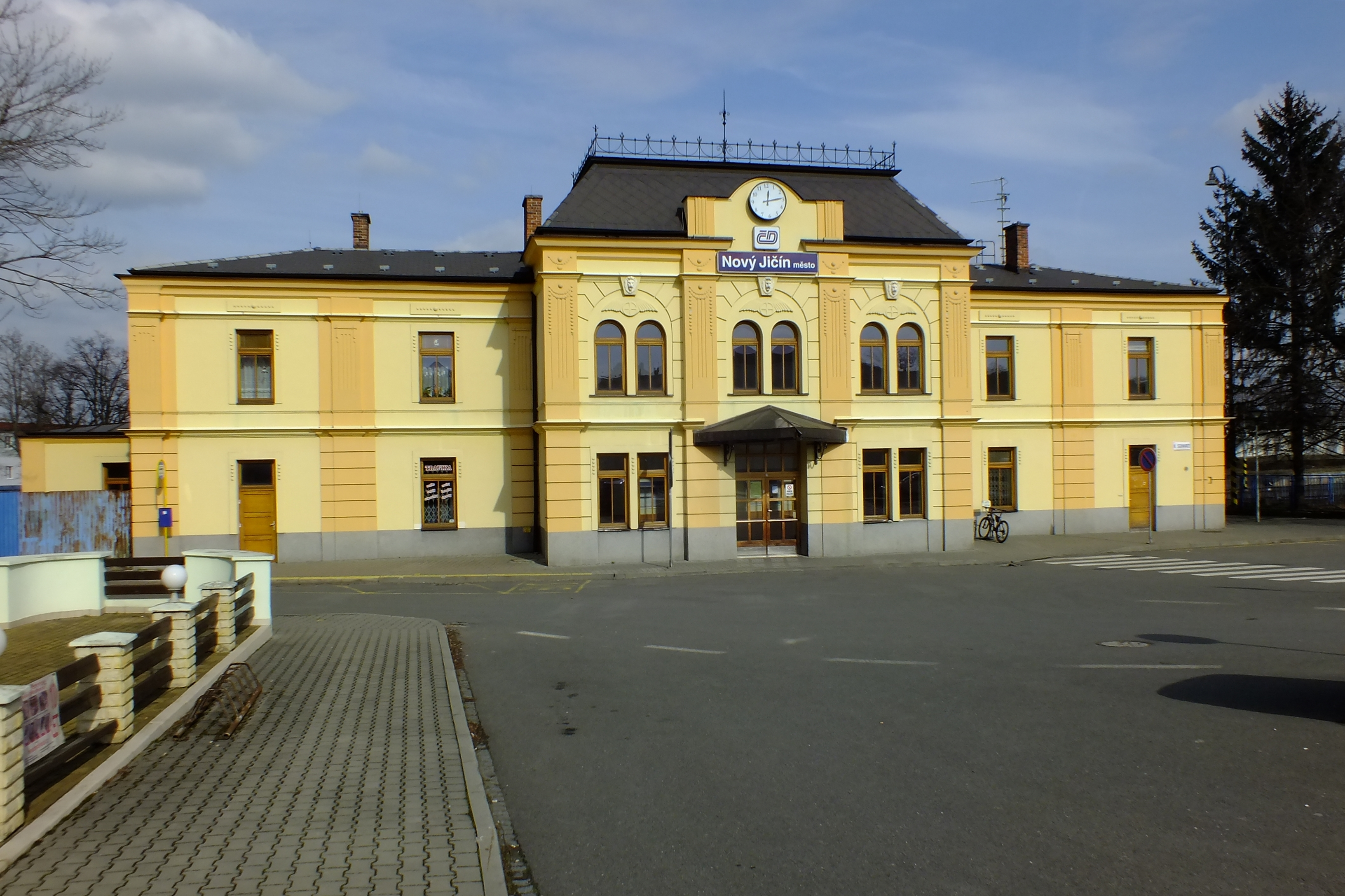 Staniční budova